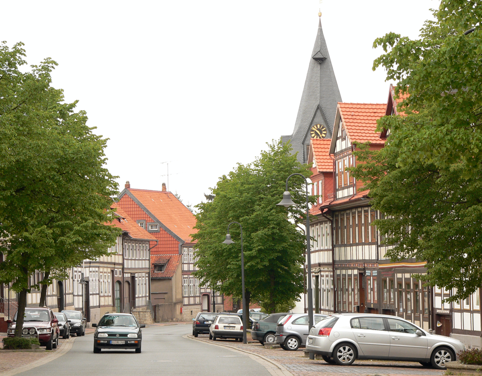 Hauptstraße in Lamspringe